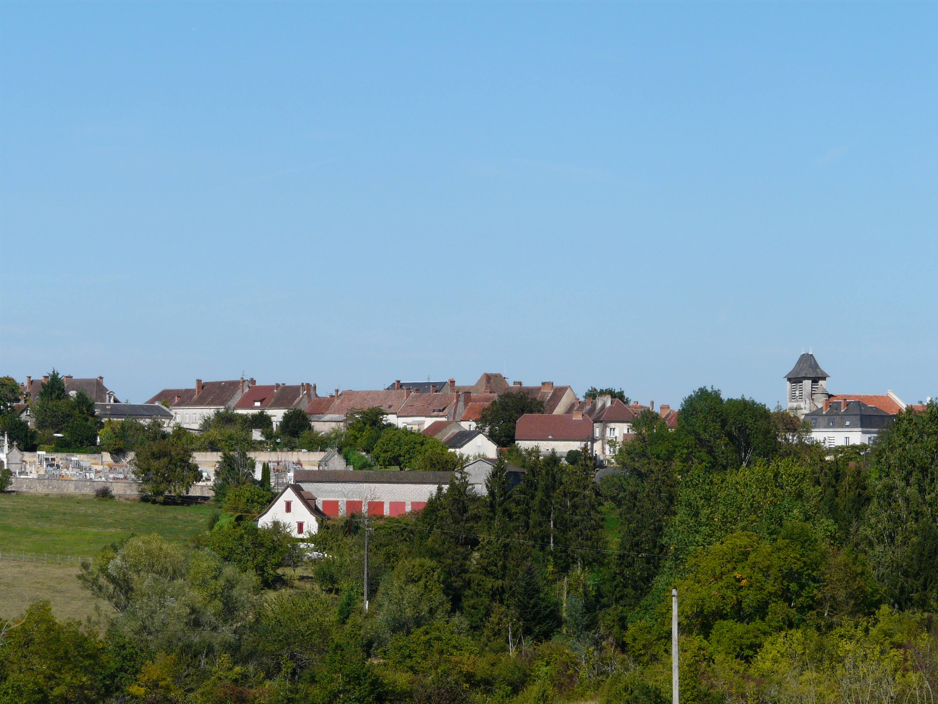 Le bourg de Rouffignac, Rouffignac-Saint-Cernin-de-Reilhac, Dordogne, France.